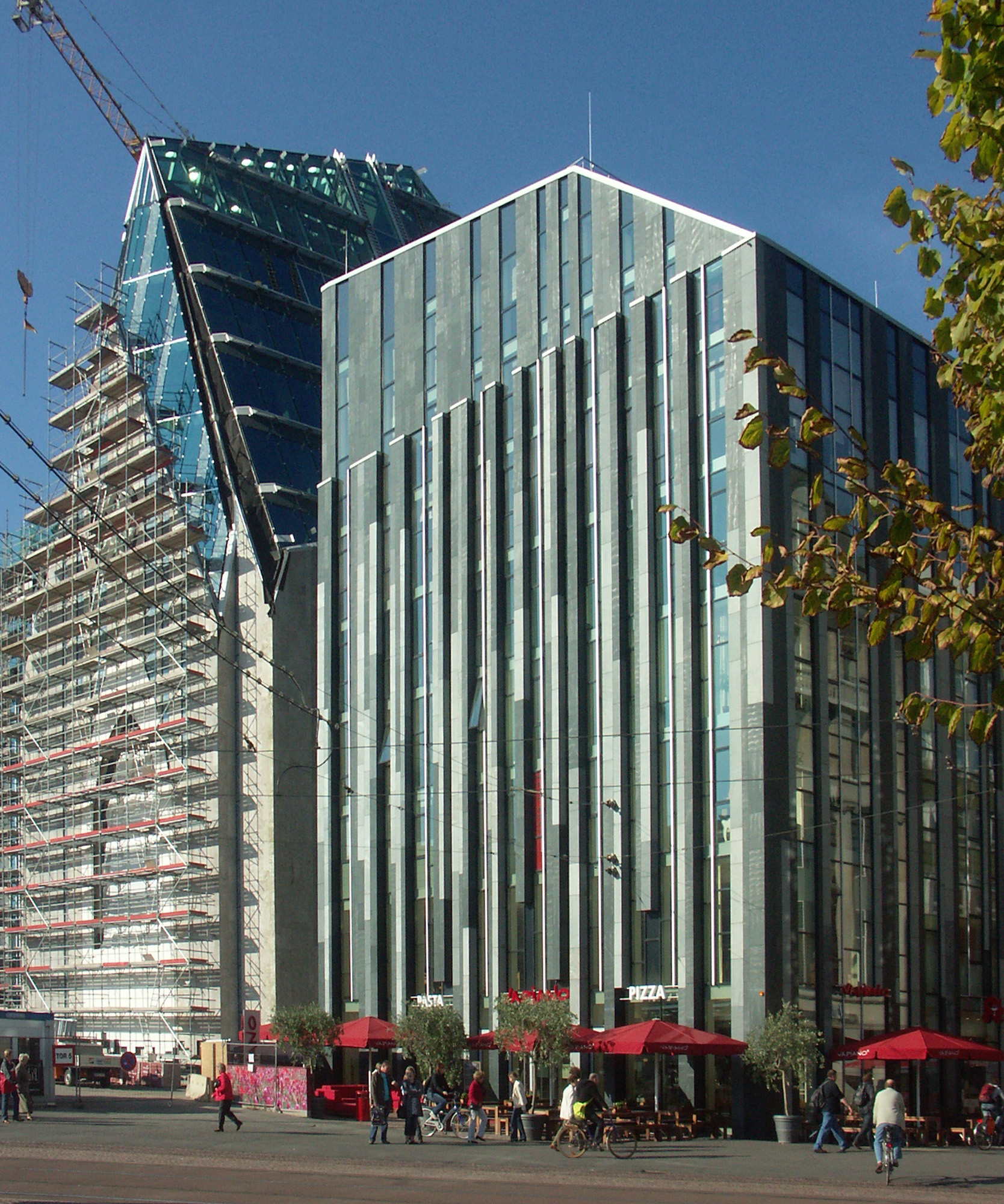 Das neue „Café Felsche“ 2010